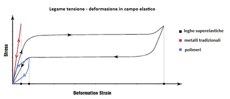 esempio di possibili curve tensione-deformazioni per un metallo tradizionale, un polimero e un materiale superelastico